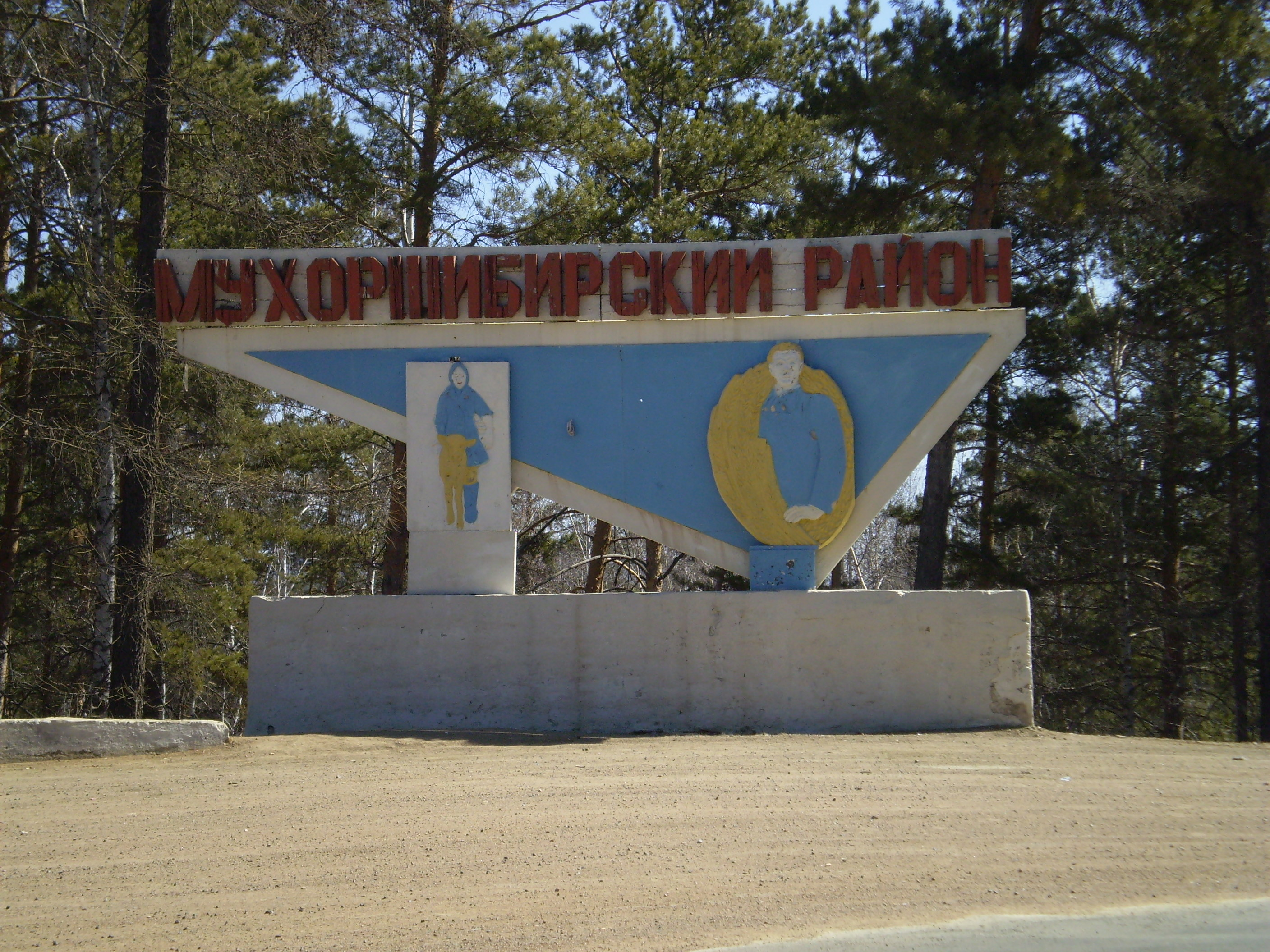 Граница Мухоршибирского района.